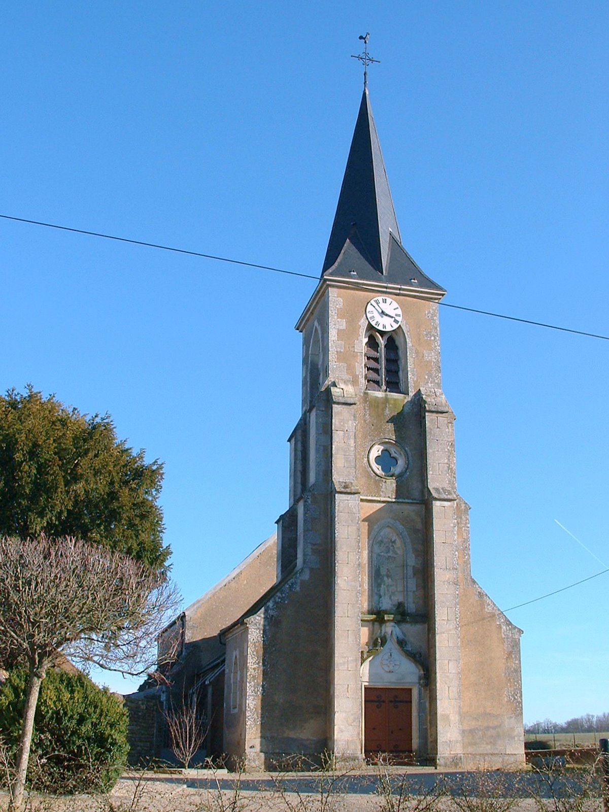 église Saint-Didier à Athie (Yonne)